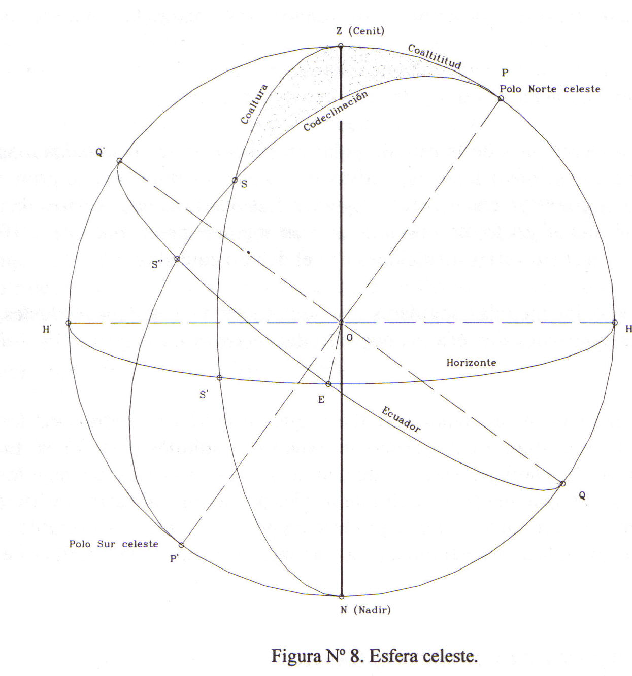 Dibujo de la esfera celeste con los puntos y lugares geometricos mas importantes